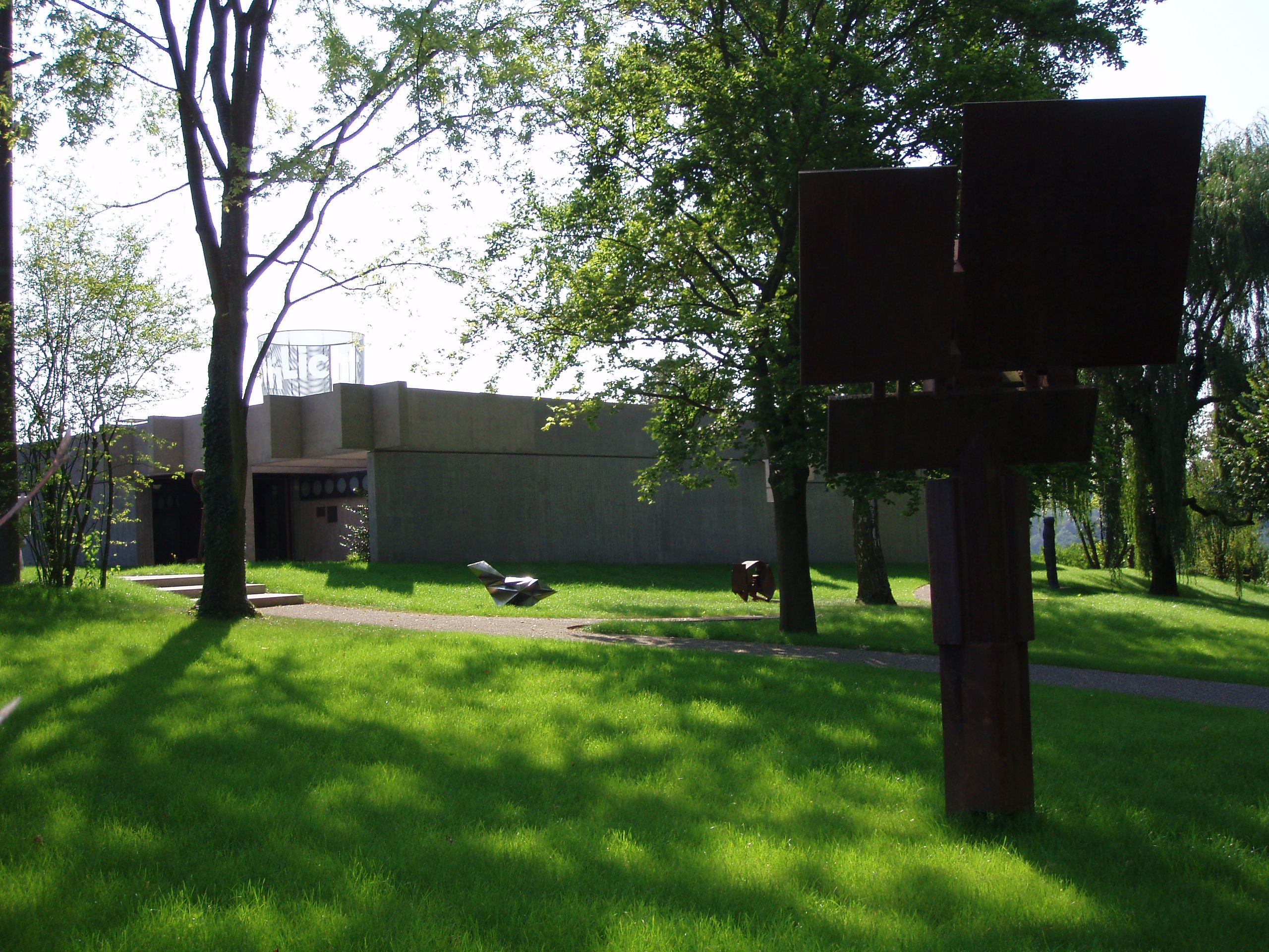 Sammlung Domnick, siehe Ottomar Domnick